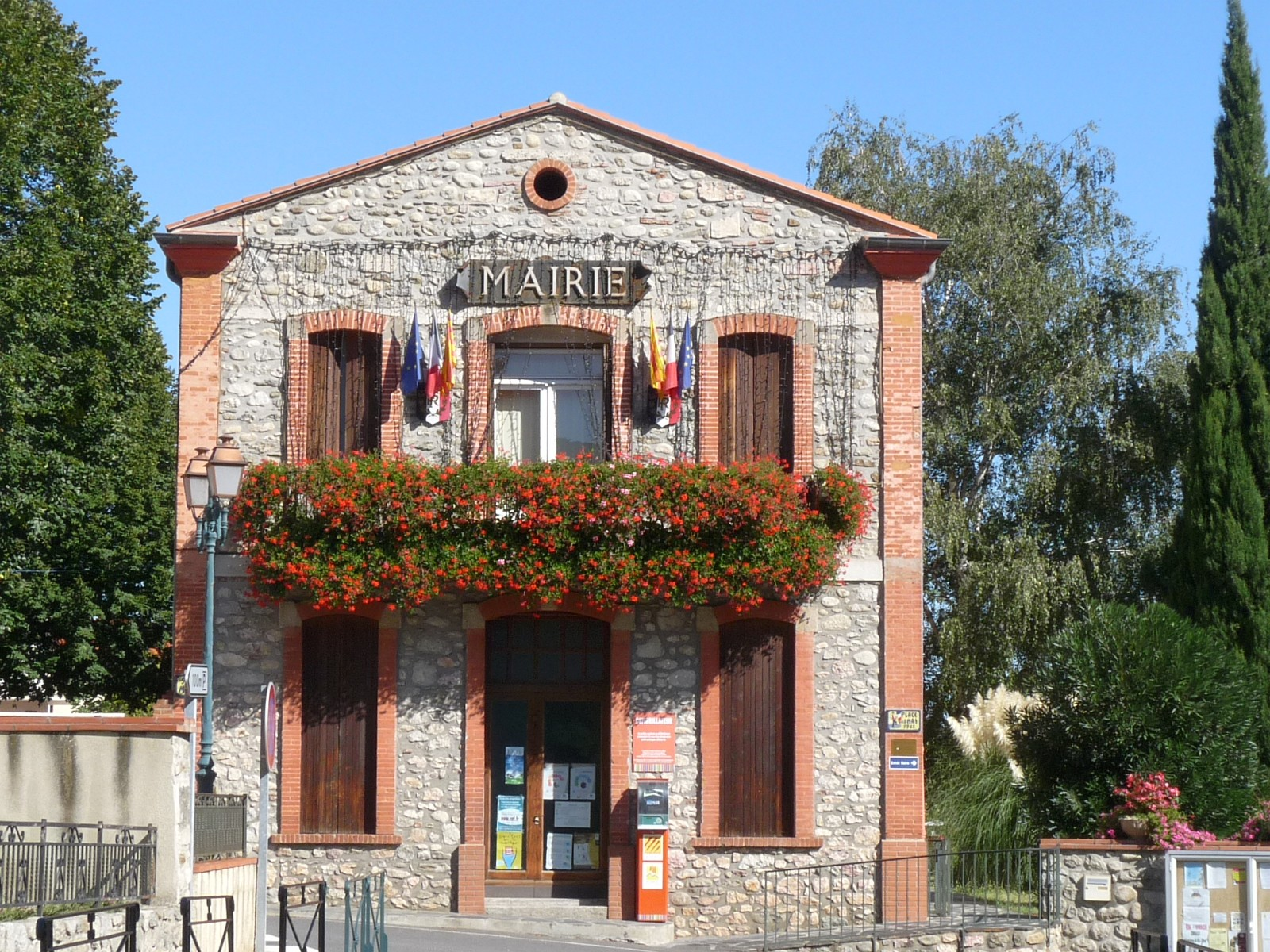 Mairie de Ria-Sirach , Pyrénées-Orientales, France